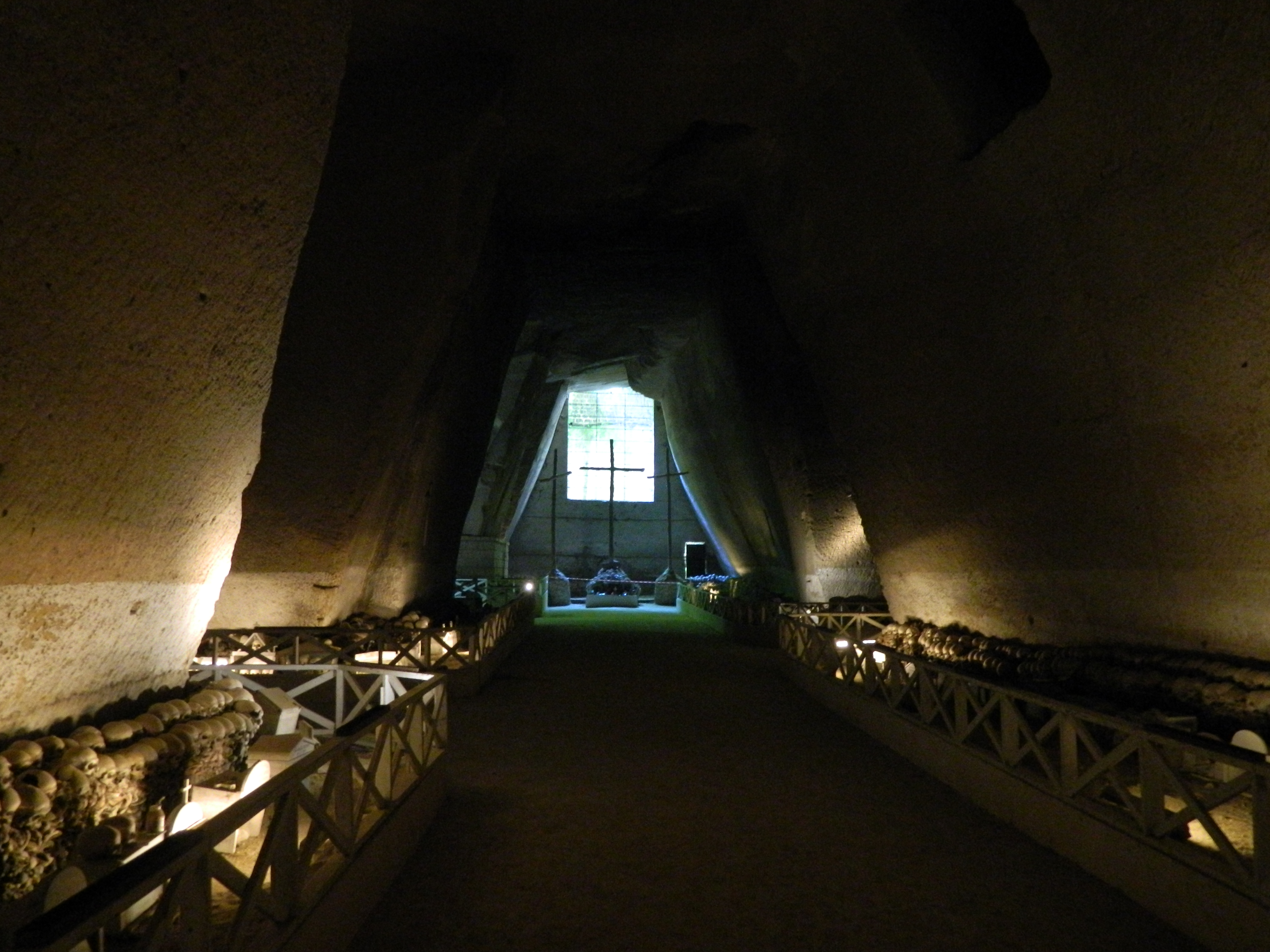 Cimitero delle Fontanelle (Napoli) - La galleria in direzione verso la Tribuna